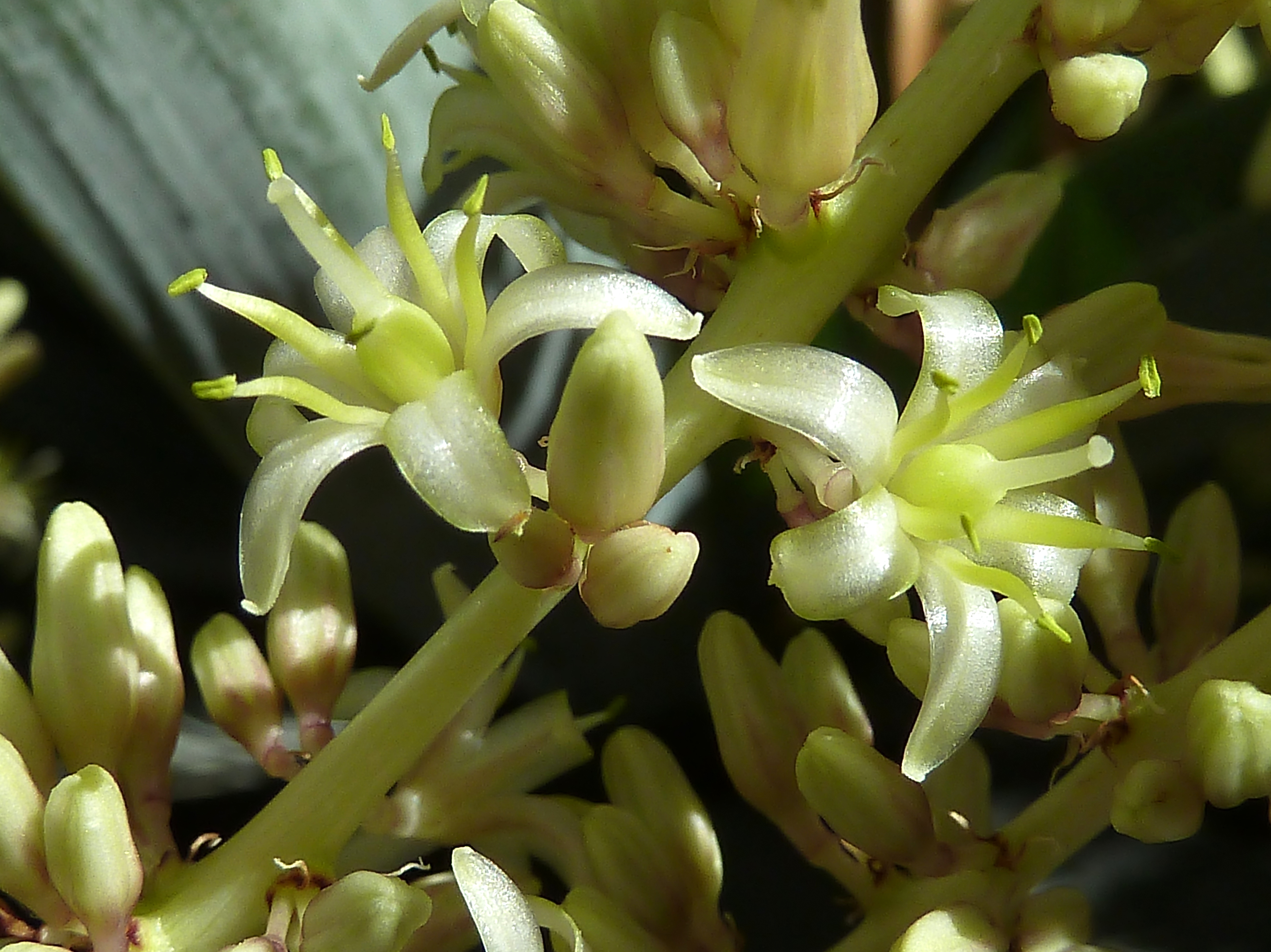 Dracaena draco (drago) - Flores en antesis - Cultivado/ornamental, Avda de La Libertad, Albatera (Provincia de Alicante, España).